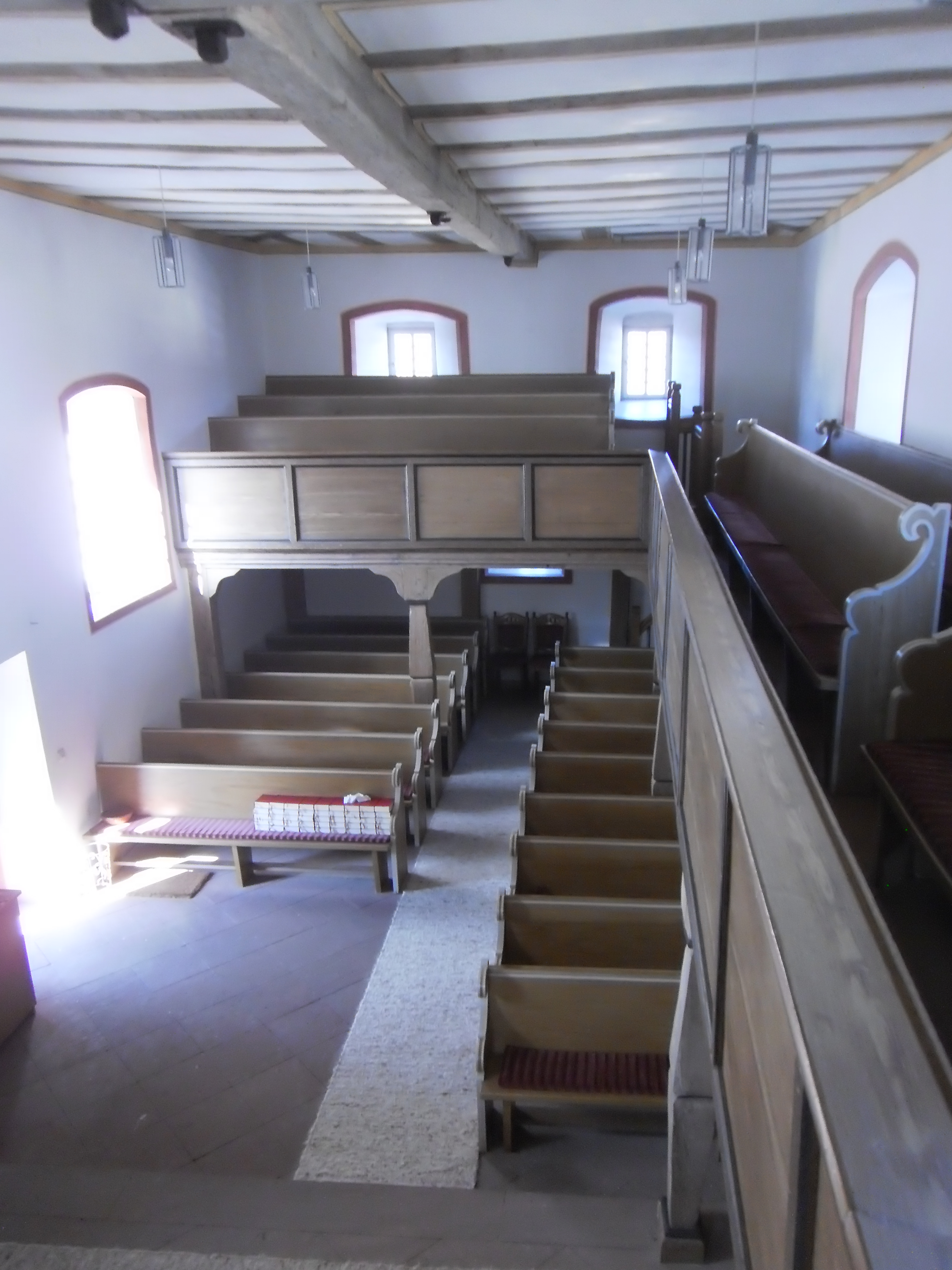 Evangelische Kirche Bissenberg, Leun, Lahn-Dill-Kreis, Hessen, Deutschland